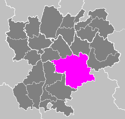 Maps of arrondissements and cantons of France: Arrondissement de Grenoble.PNG (Région Rhône-Alpes)